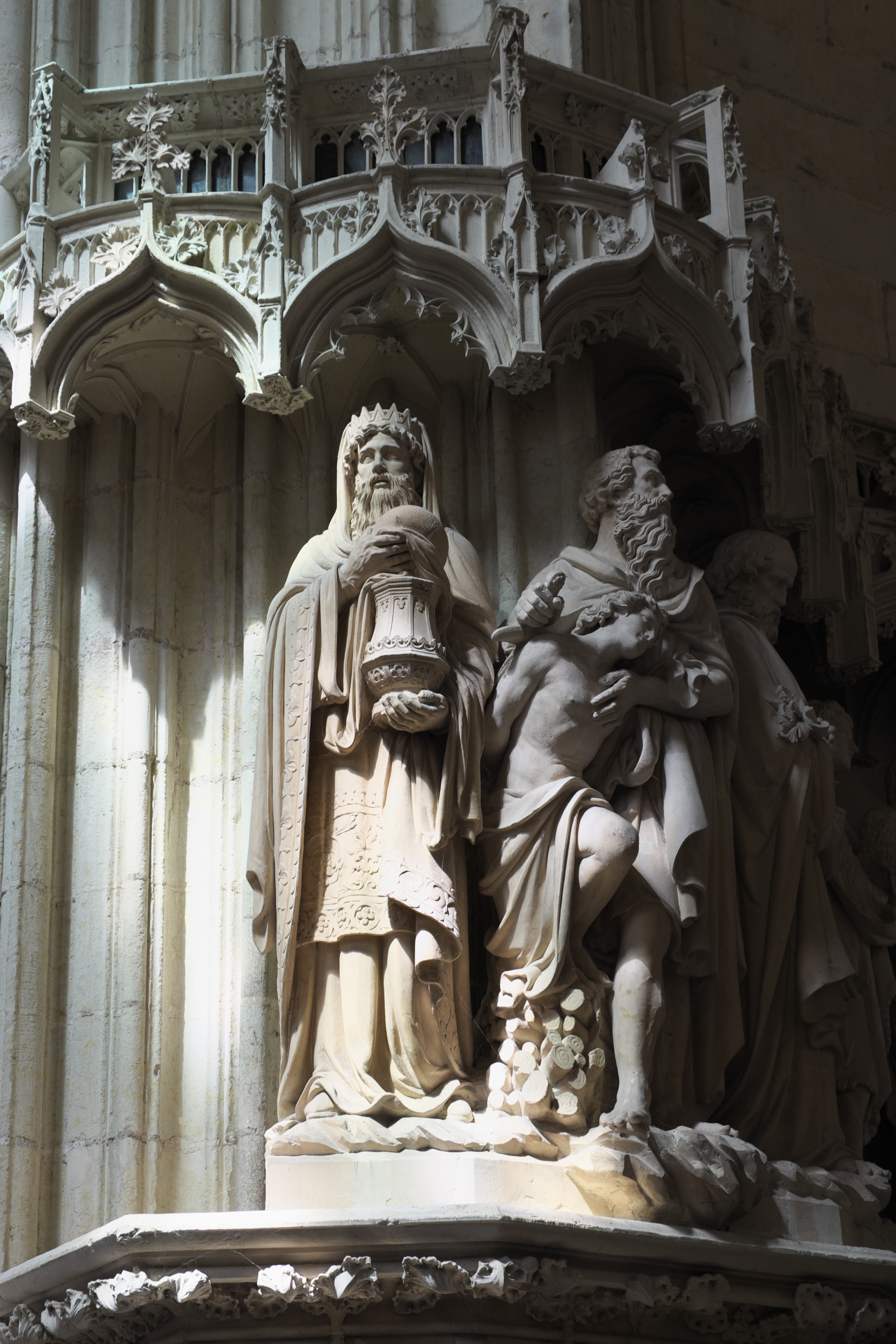 Kathedrale Saint-Pierre-et-Saint-Paul in Nantes im Département Loire-Atlantique (Pays de la Loire/Frankreich), Melchisedech, Abraham und Isaak